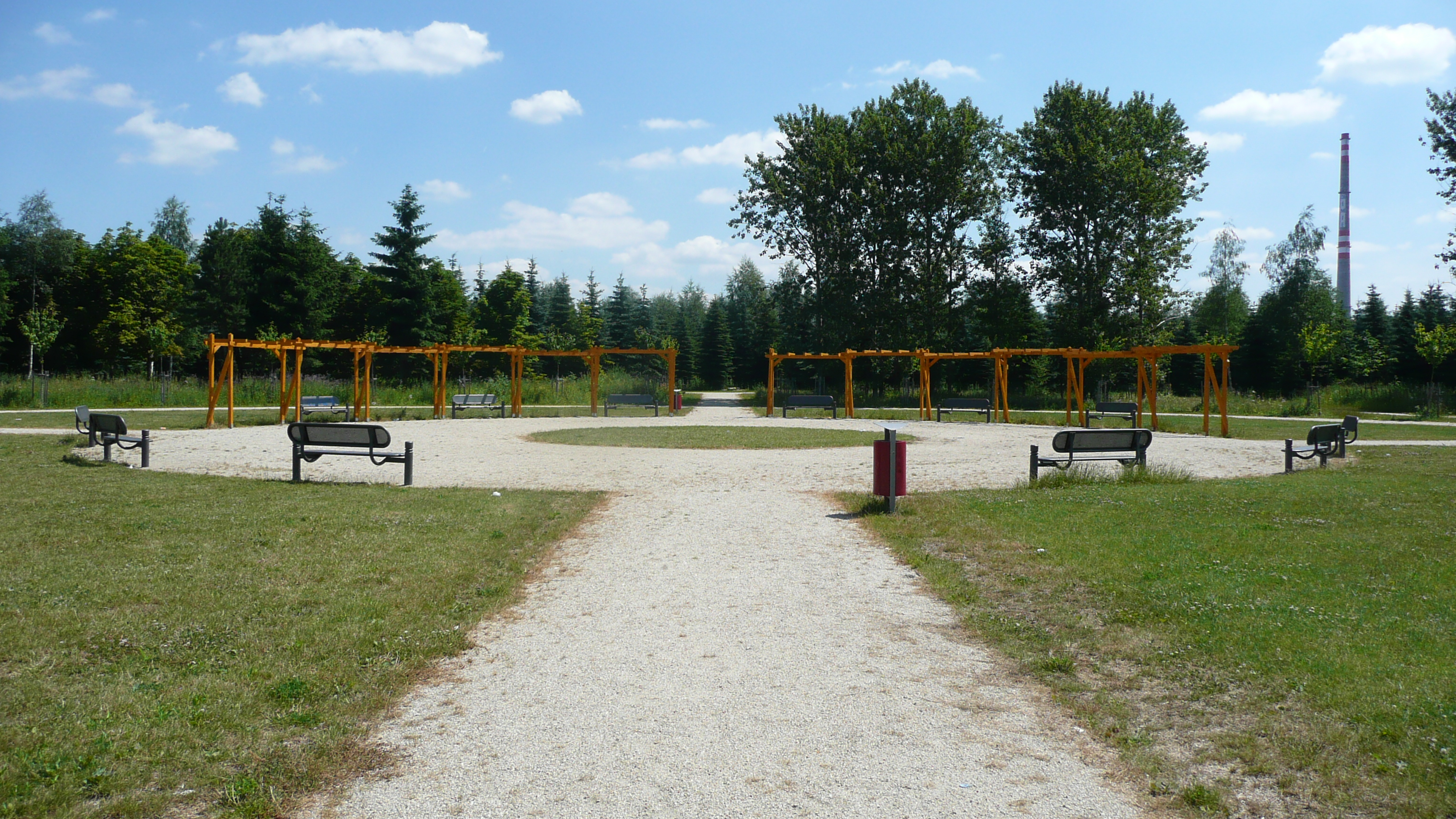 Odpočinkové místo na areálu Bohemia v Sokolově.